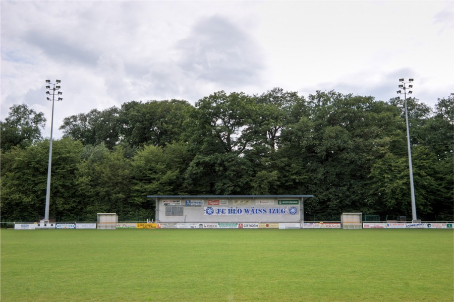 D'Haapttribün vum Izeger Terrain ("Stade Albert Kongs")